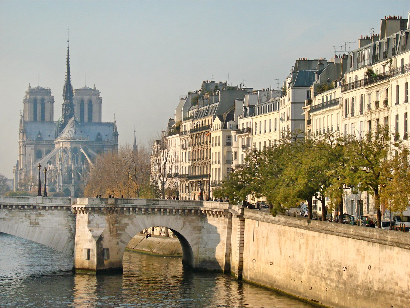 Le quai de Béthune dans l'île St Louis, le pont de la Tournelle et la Seine. Au fond, le chevet de Notre-Dame de Paris.